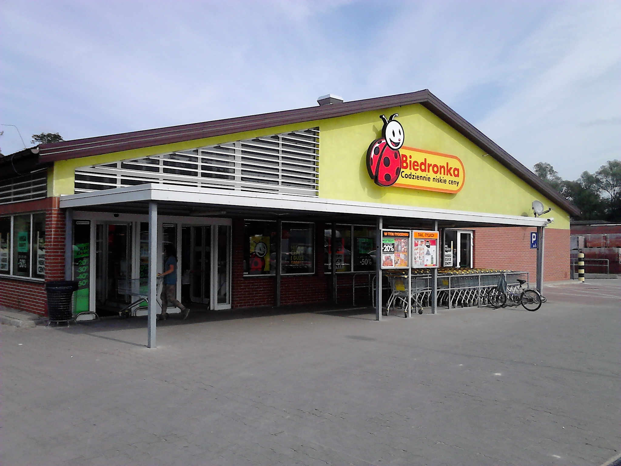 Sklep sieci Biedronka przy ul. Nałęczowskiej w Bochotnicy